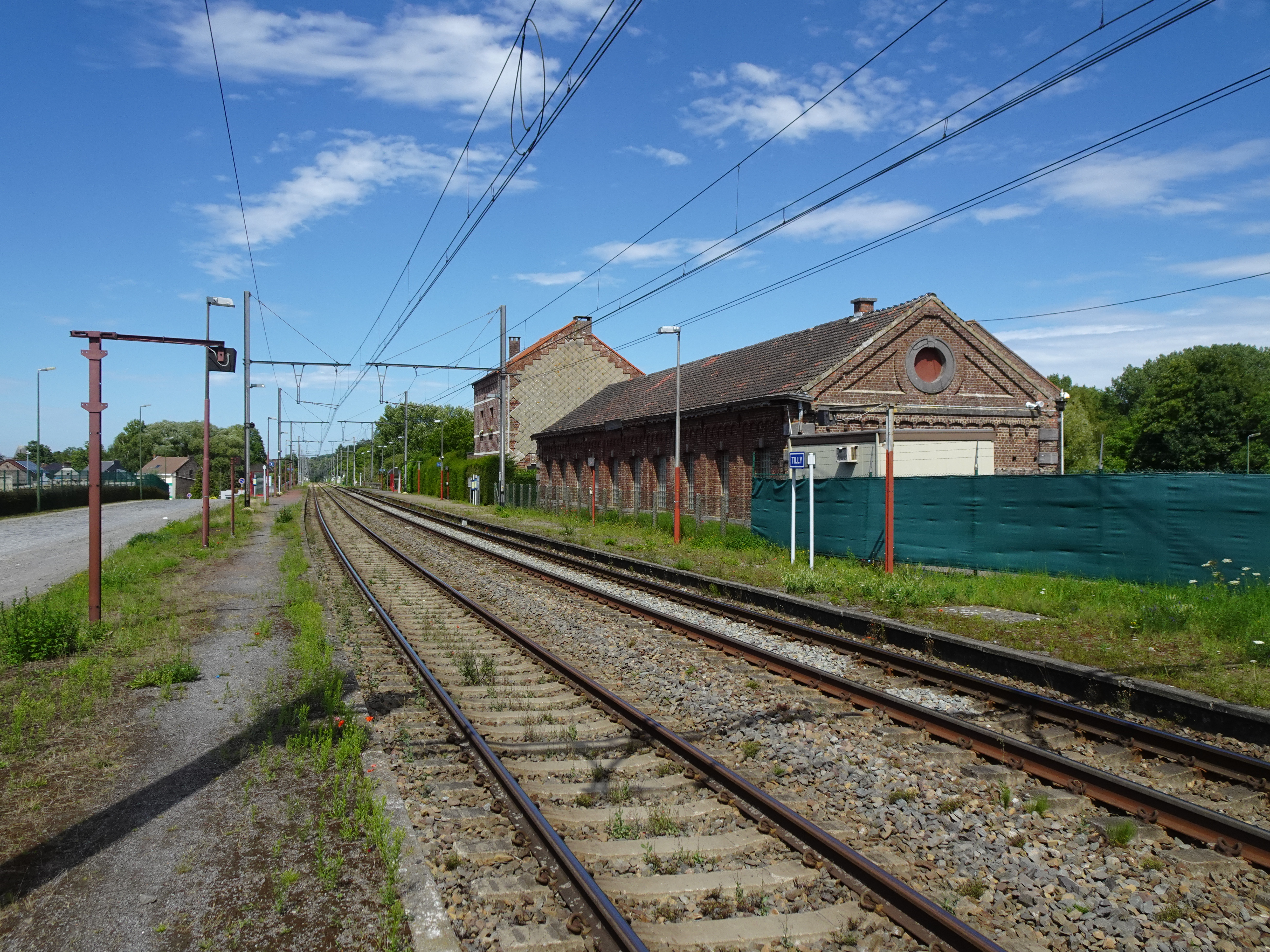 Bâtiment de la gare de Tilly, reconverti en entrepôt. Il s'agit d'un bâtiment du type "Standard" du Grand Central Belge, construit en 1877.